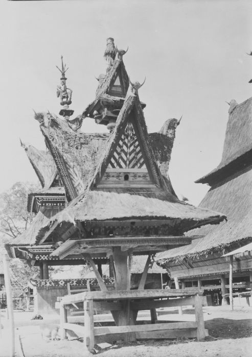 foto. Karo Batak schedelhuis (geriten) en duiventil